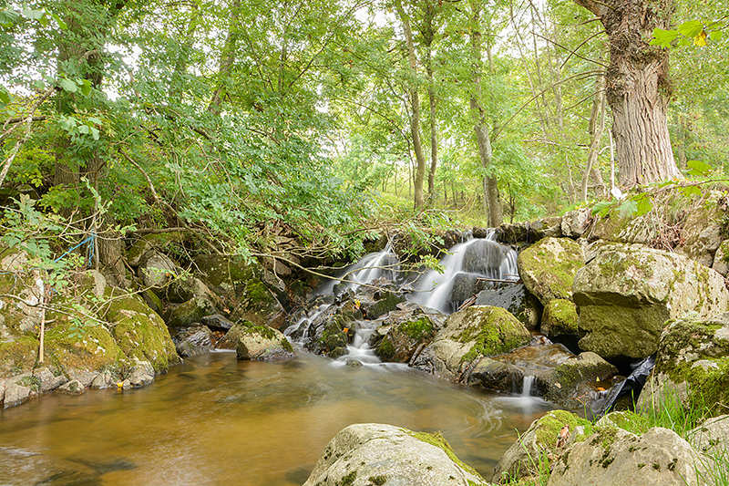 RUISSEAU BUCOLIQUE